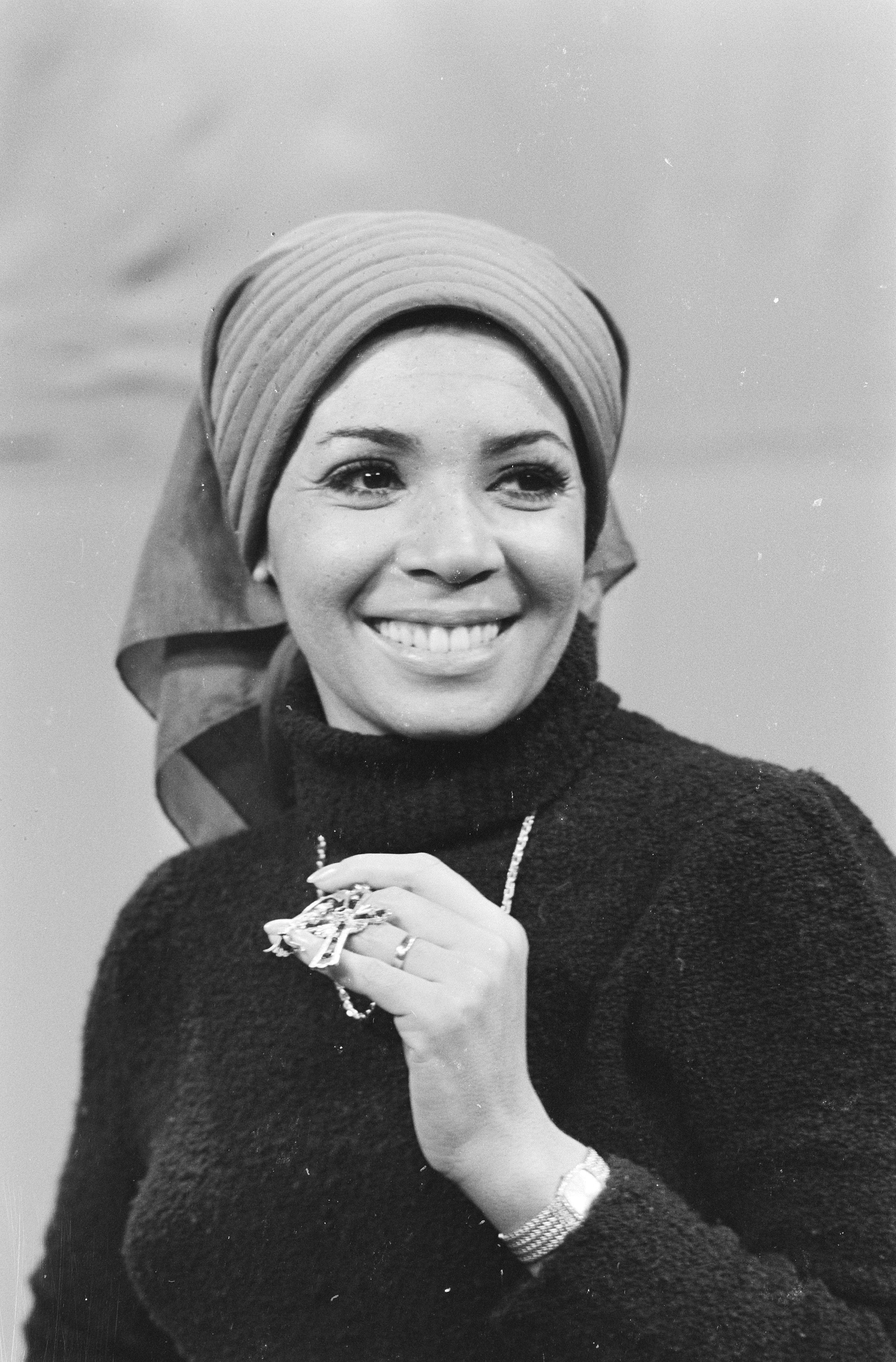 Collectie / Archief : Fotocollectie Anefo Reportage / Serie : [ onbekend ] Beschrijving : TV-opnamen van Engelse zangeres Shirley Bassey ; Shirley Bassey , kop Datum : 11 januari 1971 Trefwoorden : TV-opnamen, zangeressen Persoonsnaam : Bassey, Shirley Fotograaf : Mieremet, Rob / Anefo Auteursrechthebbende : Nationaal Archief Materiaalsoort : Negatief (zwart/wit) Nummer archiefinventaris : bekijk toegang 2.24.01.05 Bestanddeelnummer : 924-1639